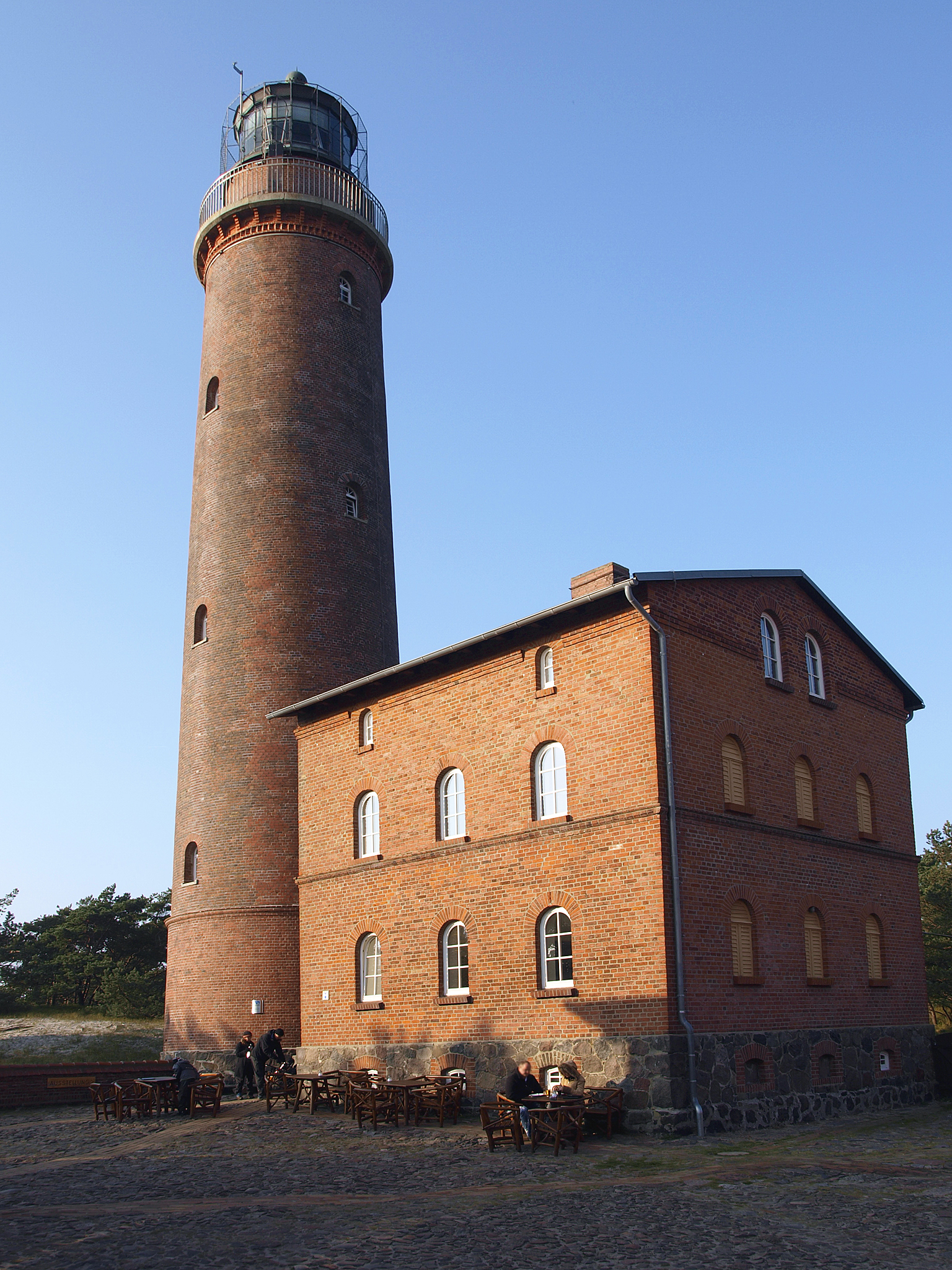 Leuchtturm am Darßer Ort, Fischland-Darß-Zingst, Mecklenburg-Vorpommern, Deutschland